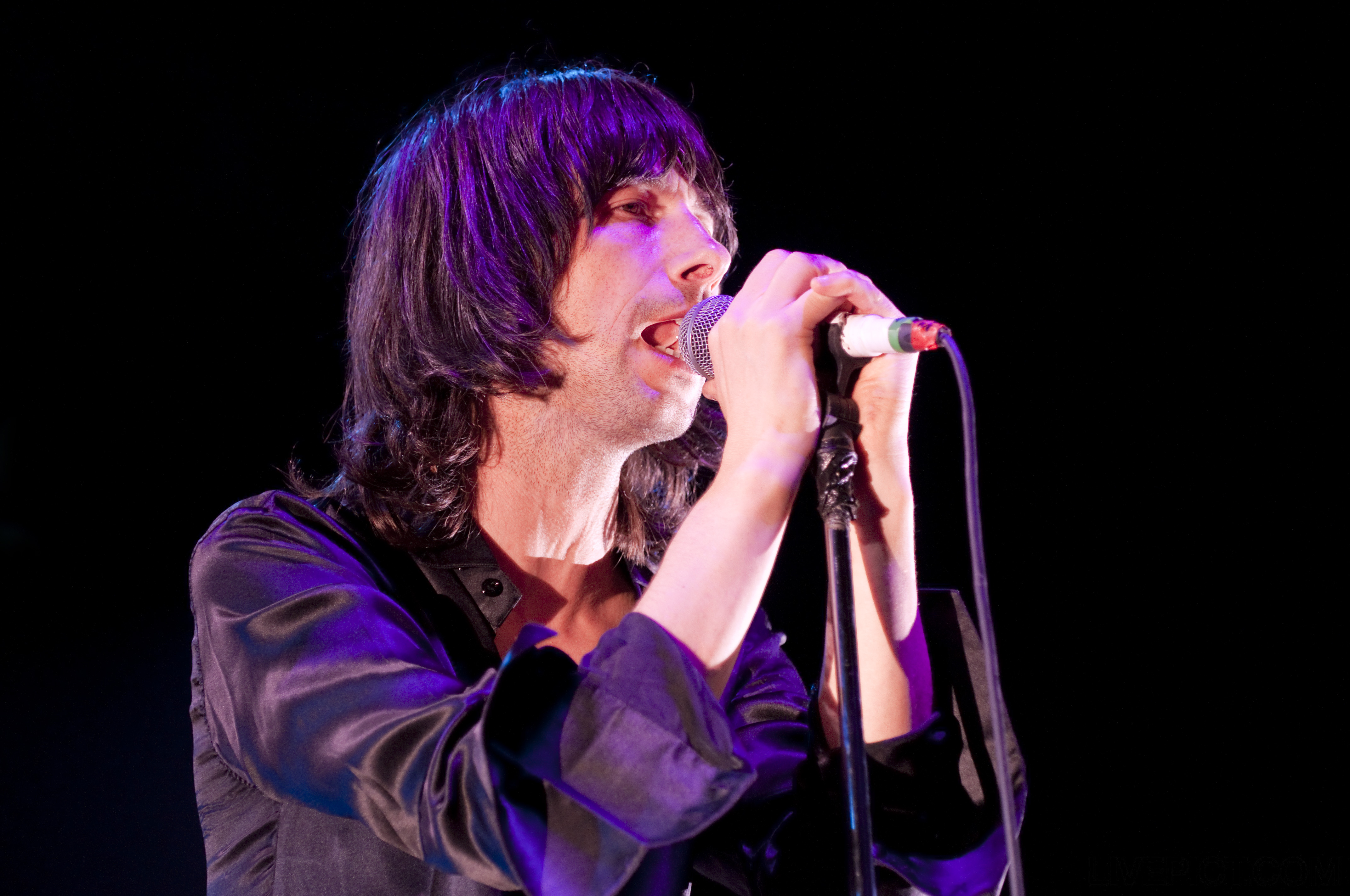 Primal Scream